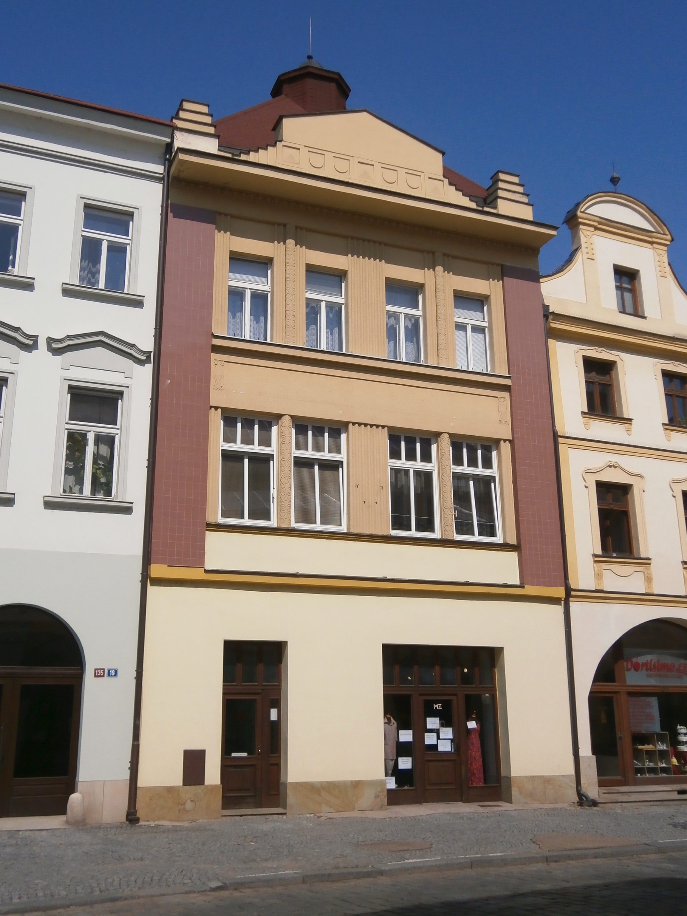 Velké náměstí čp. 134 (Hradec Králové) - bývalý obchodní dům Samuela Ganze